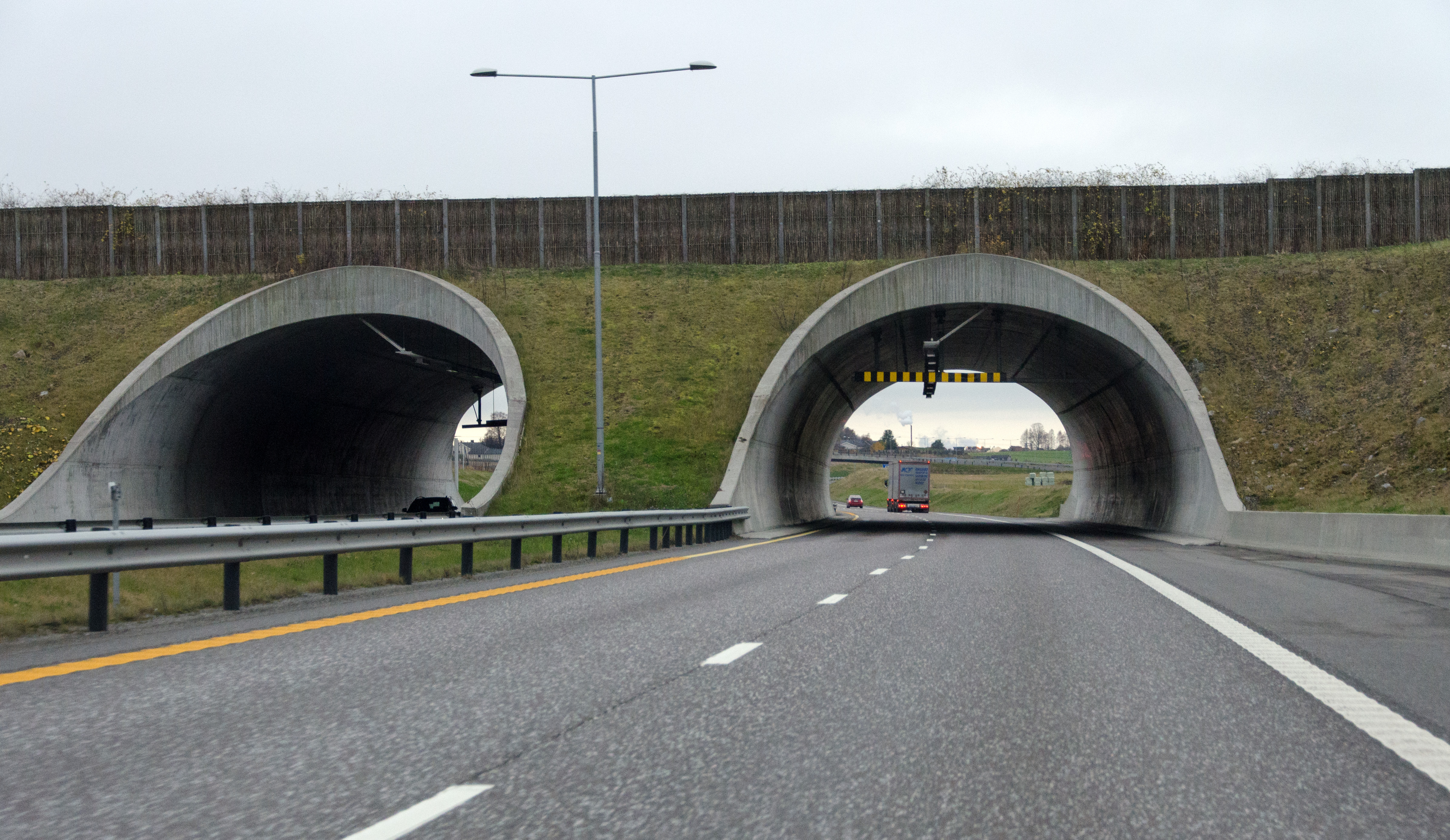 Danebo miljøtunnel